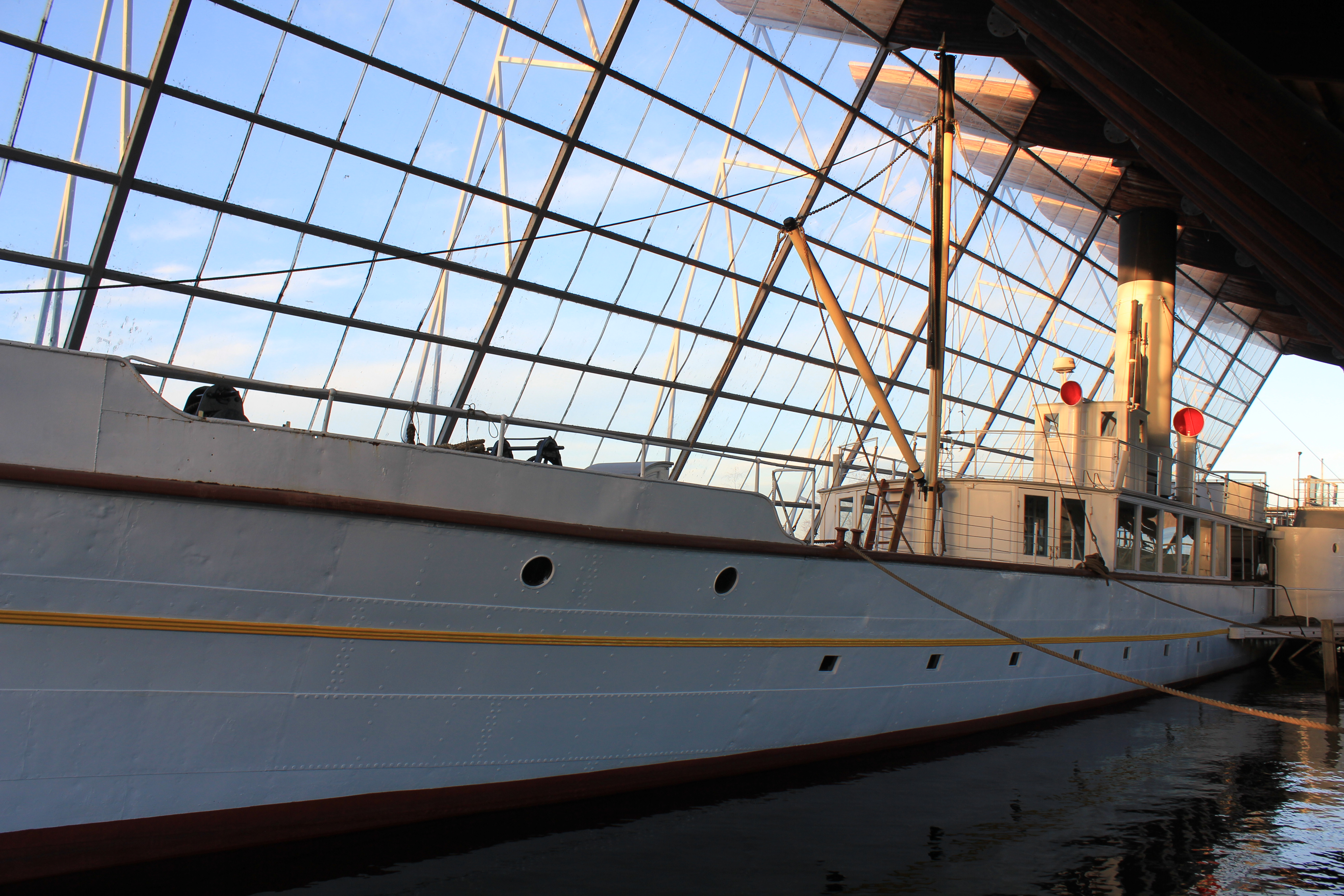 Skibladner i vinteropplag på Gjøvik.